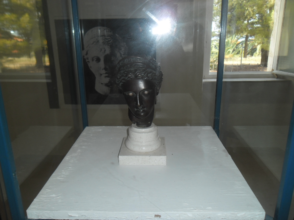 grad Vis